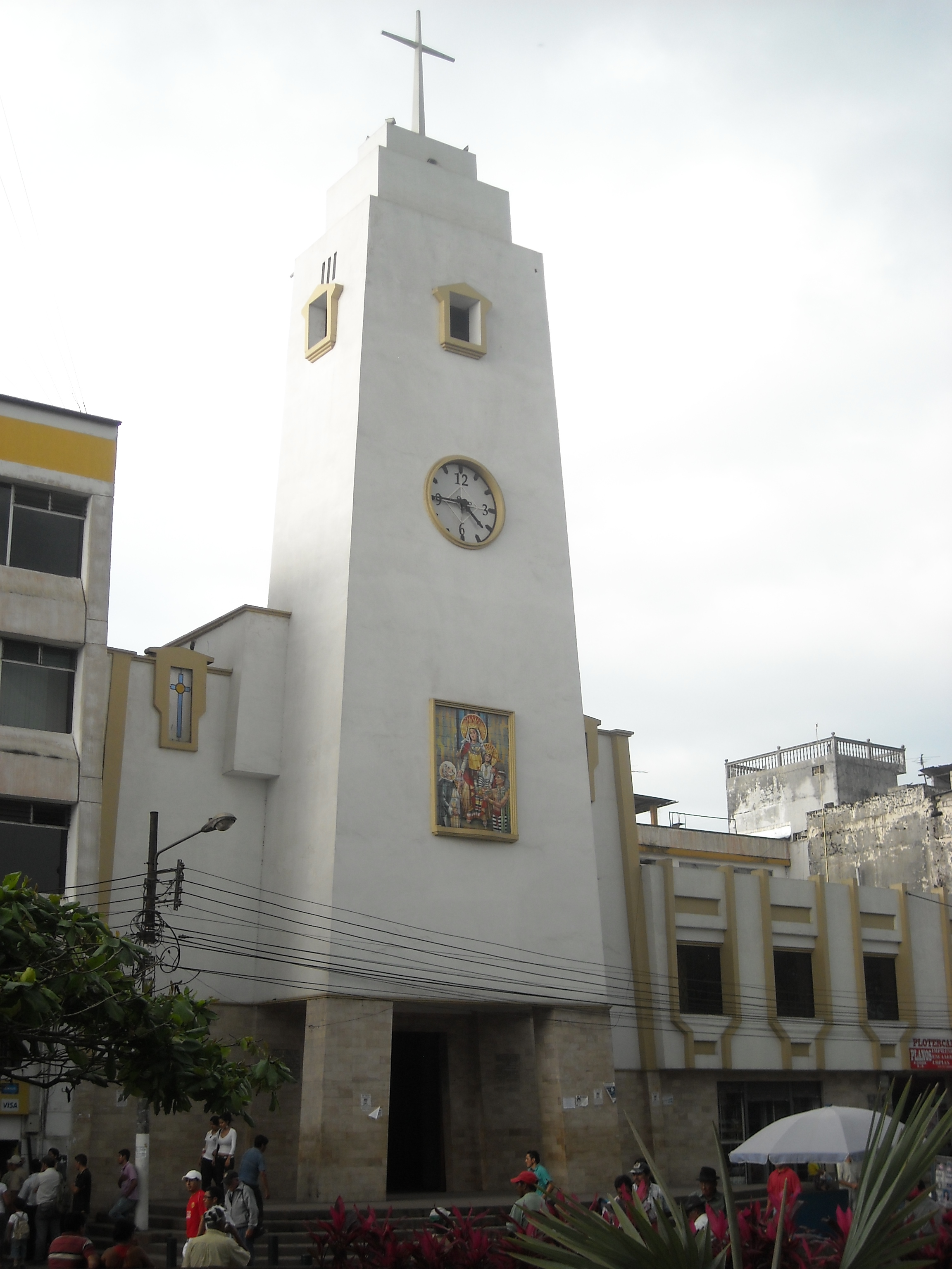 La antigua Catedral de Santo Domingo (de la Ascension)